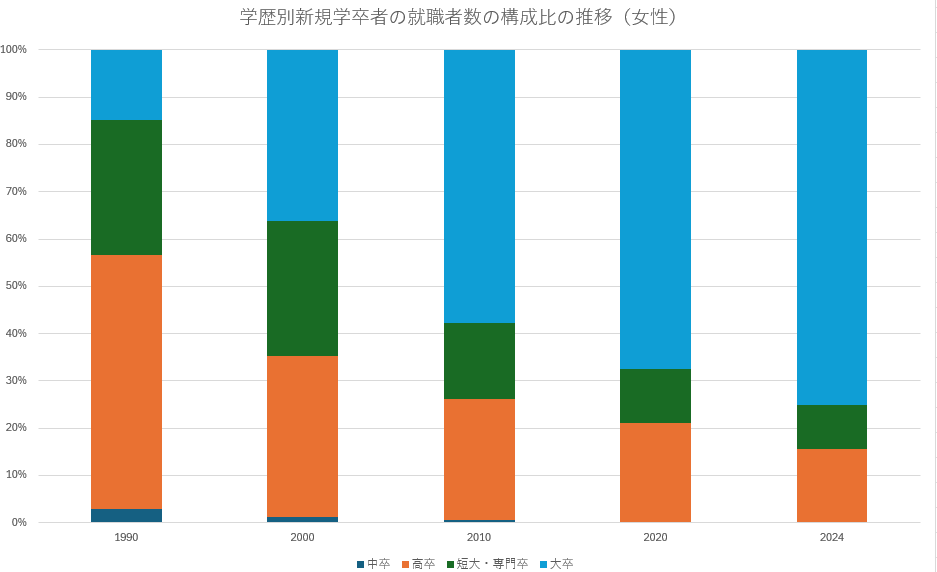 女性新卒者就職者の学歴構成比の推移